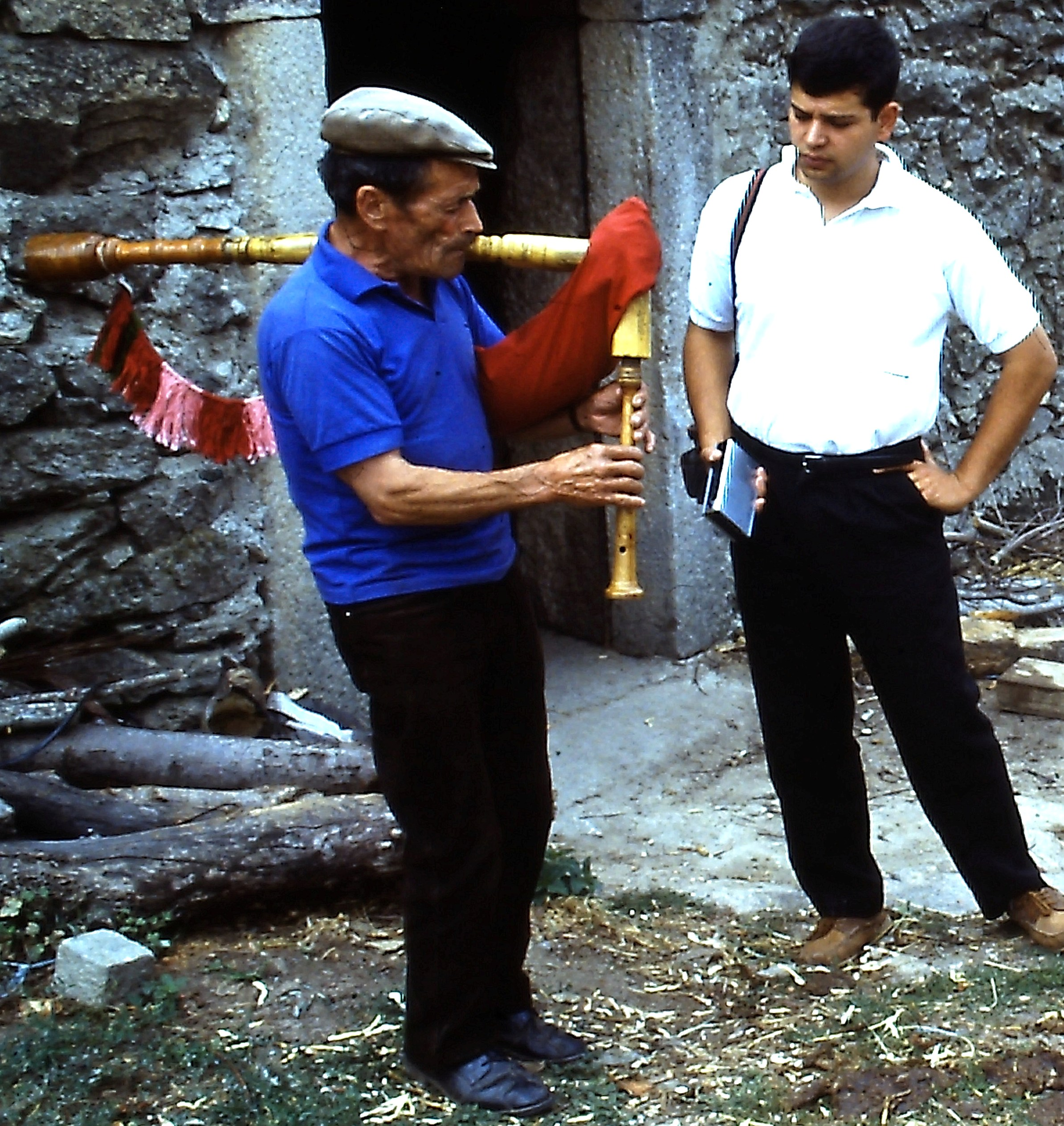 Manuel Francisco Aires, Gaiteiro de Cércio em 1991 sendo gravado por Jorge Lira